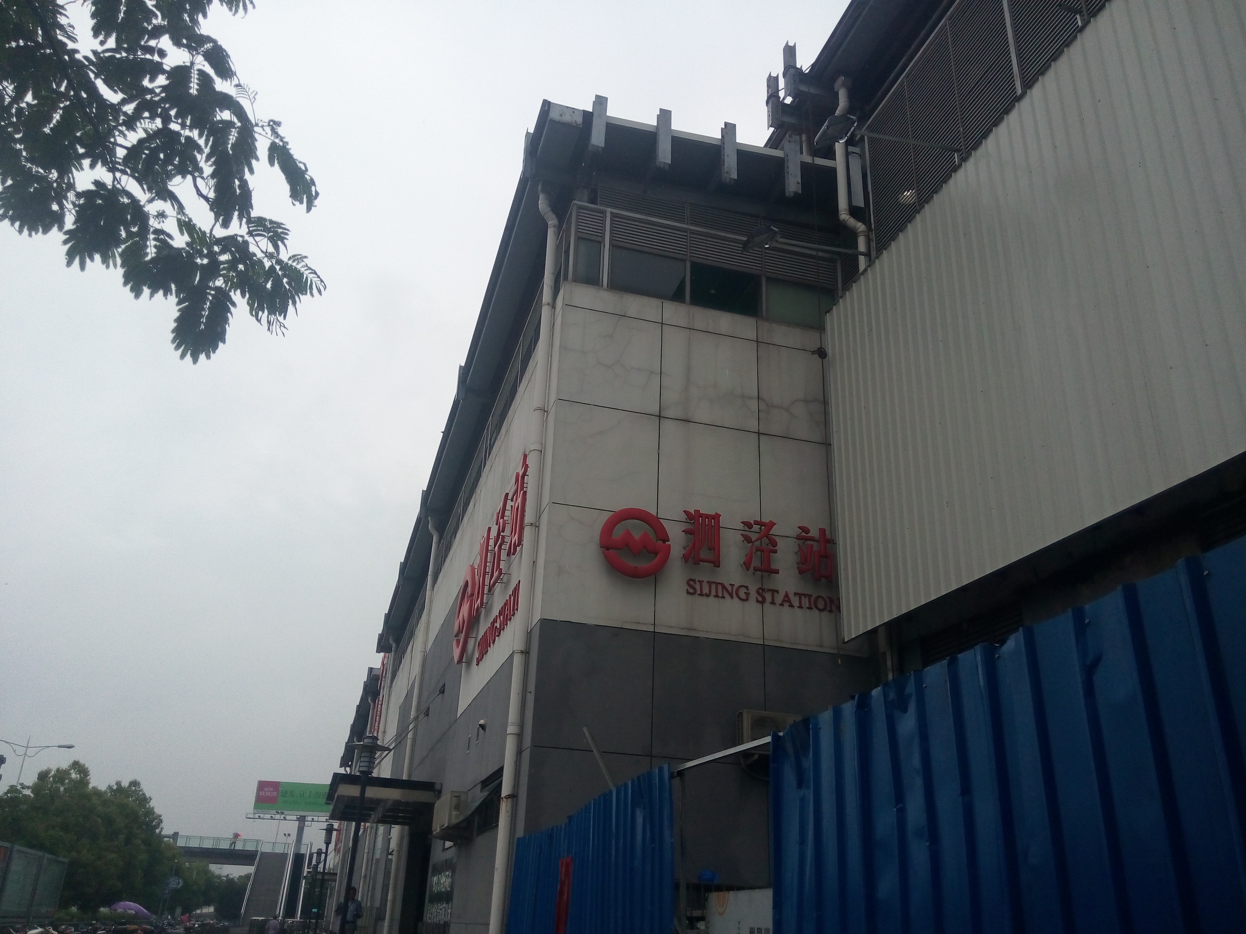 泗泾站。。